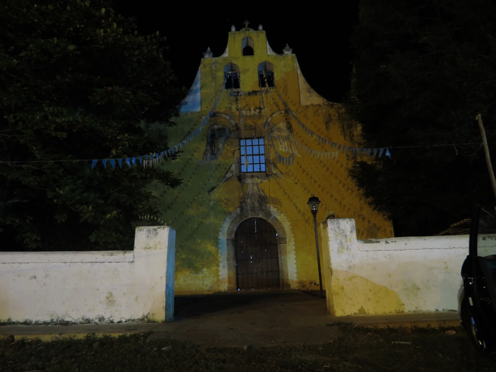 fotografía tomada en la madrugada del 14 de febrero de 2016